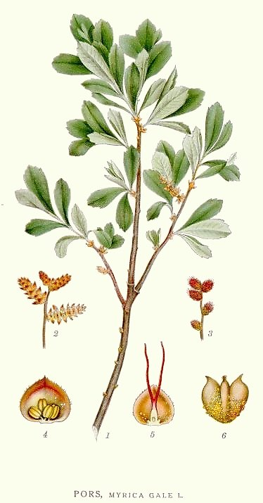 Original Description Pors, Myrica gale L.